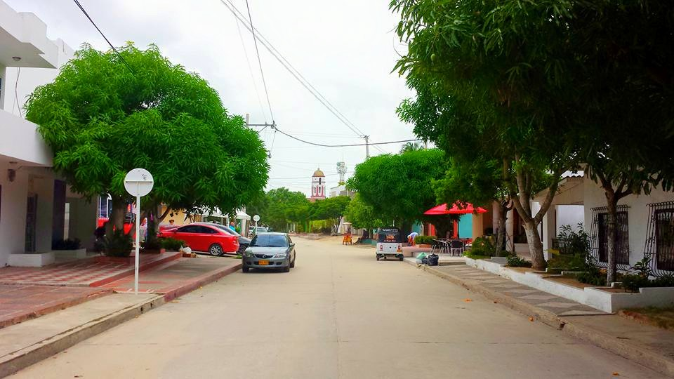 Foto de una calle tradicional en el centro del municipio de Santo Tomas